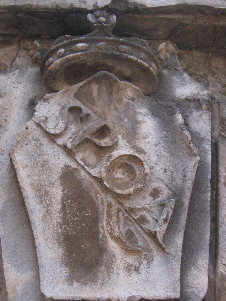 Rilievo di stemma di Alatri con la scritta SPQA